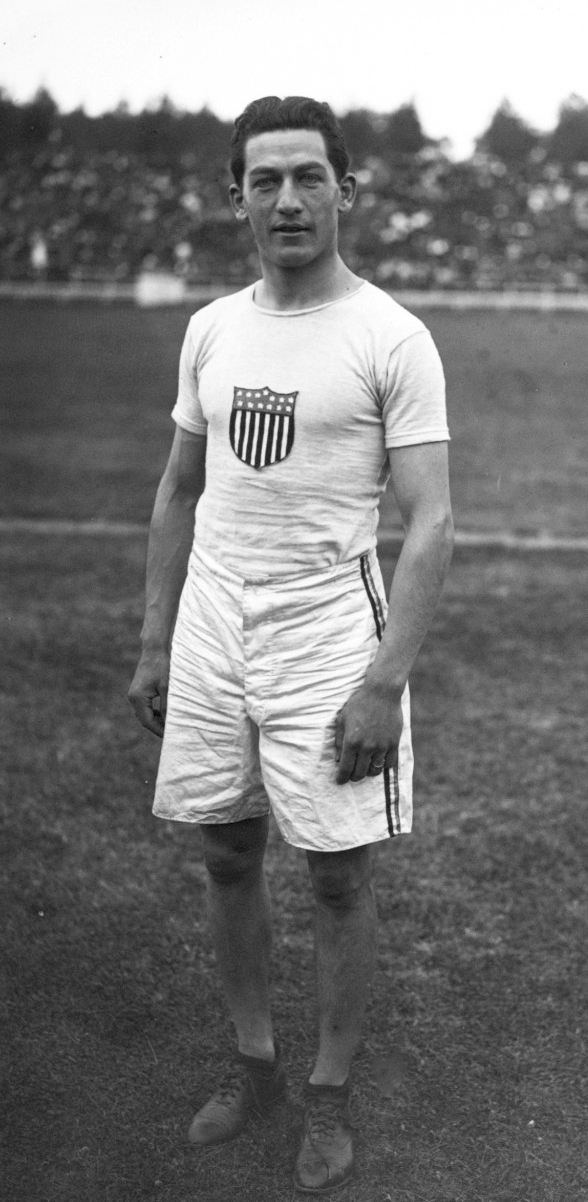 23-7-12, Reims, Abel Kiviat, américain [deuxième du 1500 mètres, portrait] : [photographie de presse] / [Agence Rol]